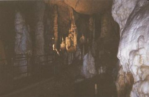 Postojna Caverns in 2003